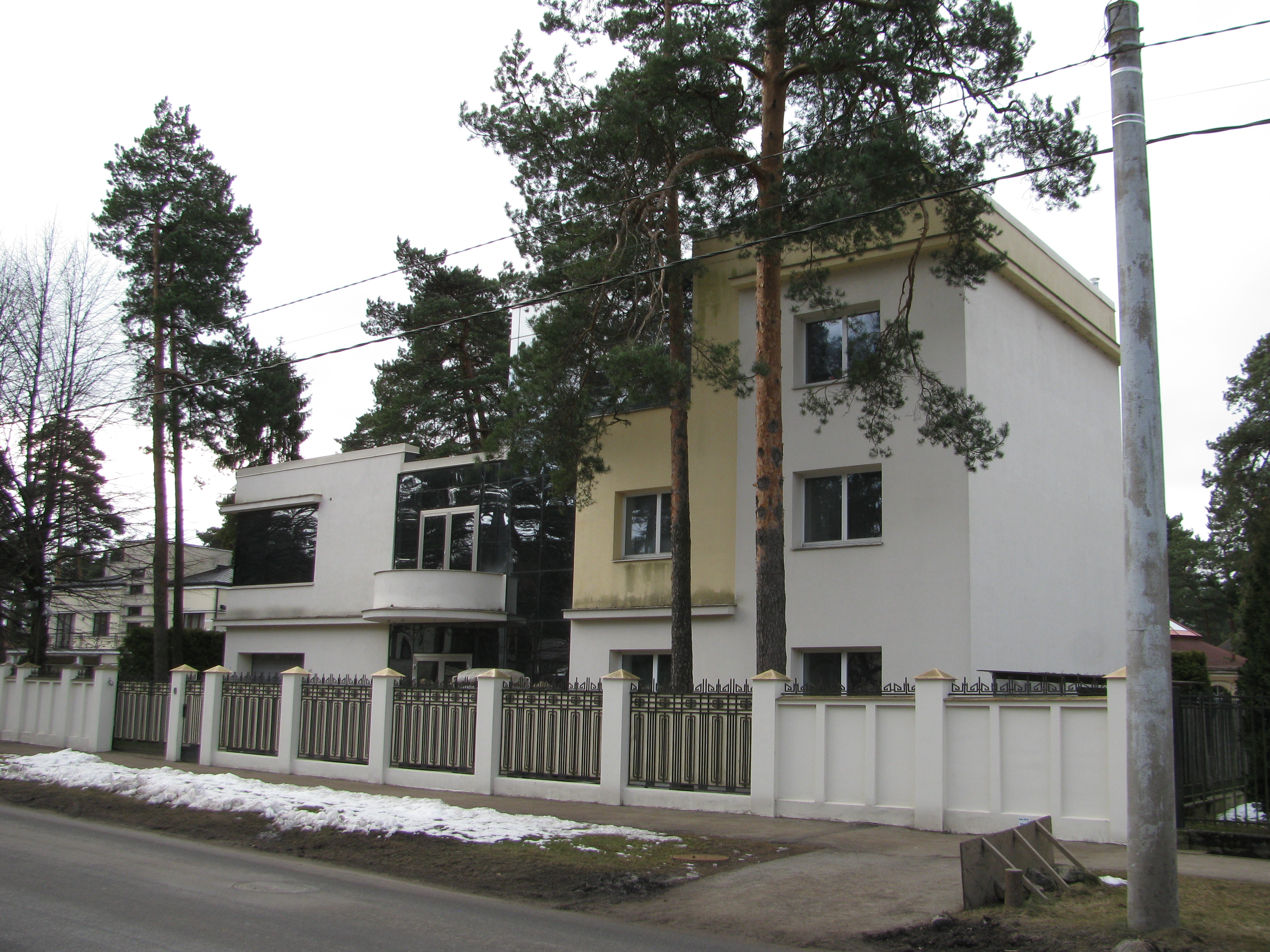 Savrupmāja, Ziemeļu rajons, Ezermalas iela 61